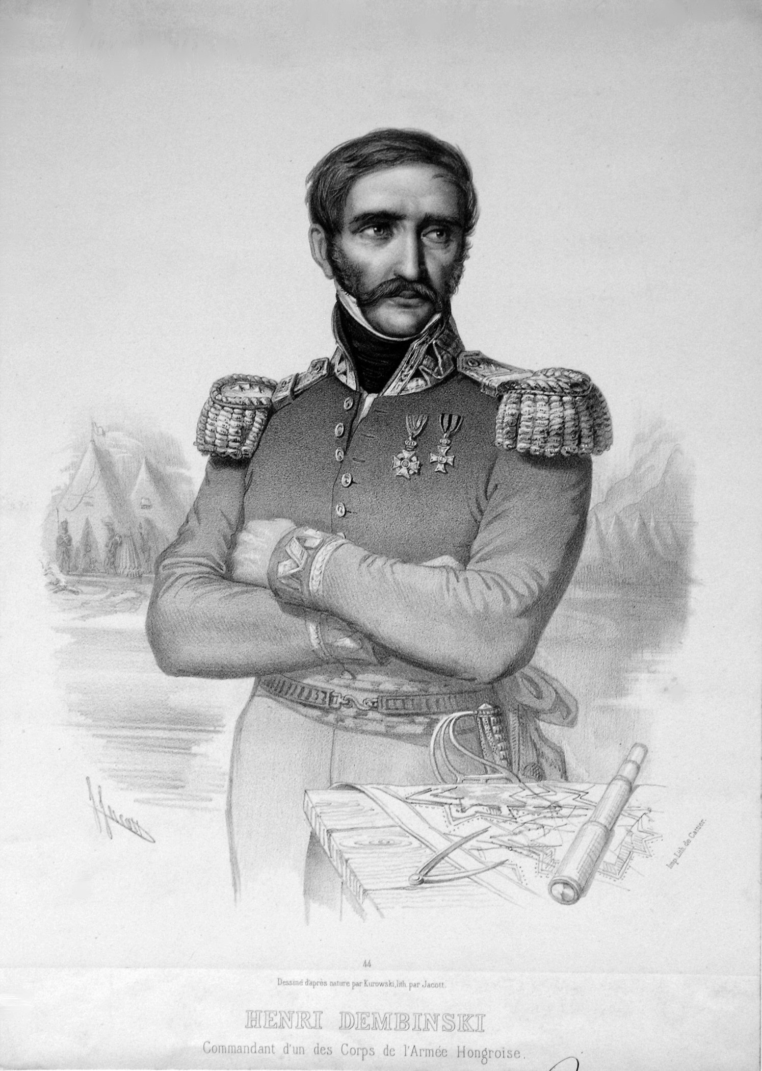 Henri Dembinski/Henryk Dembiński (1791-1864), Lithographie von Jacott nach Kurowski, s.a.